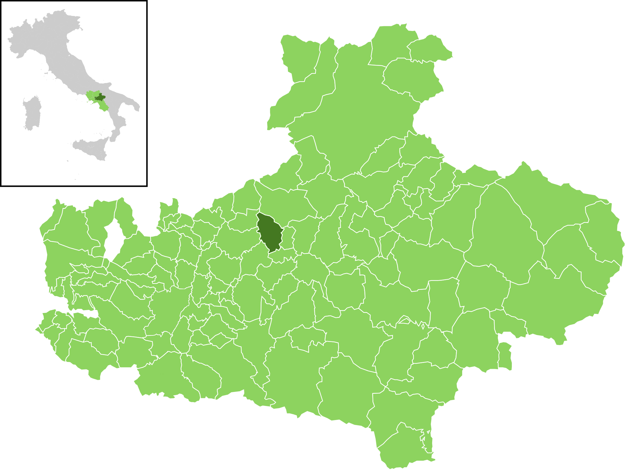 Posizione del comune all'interno della provincia di Avellino